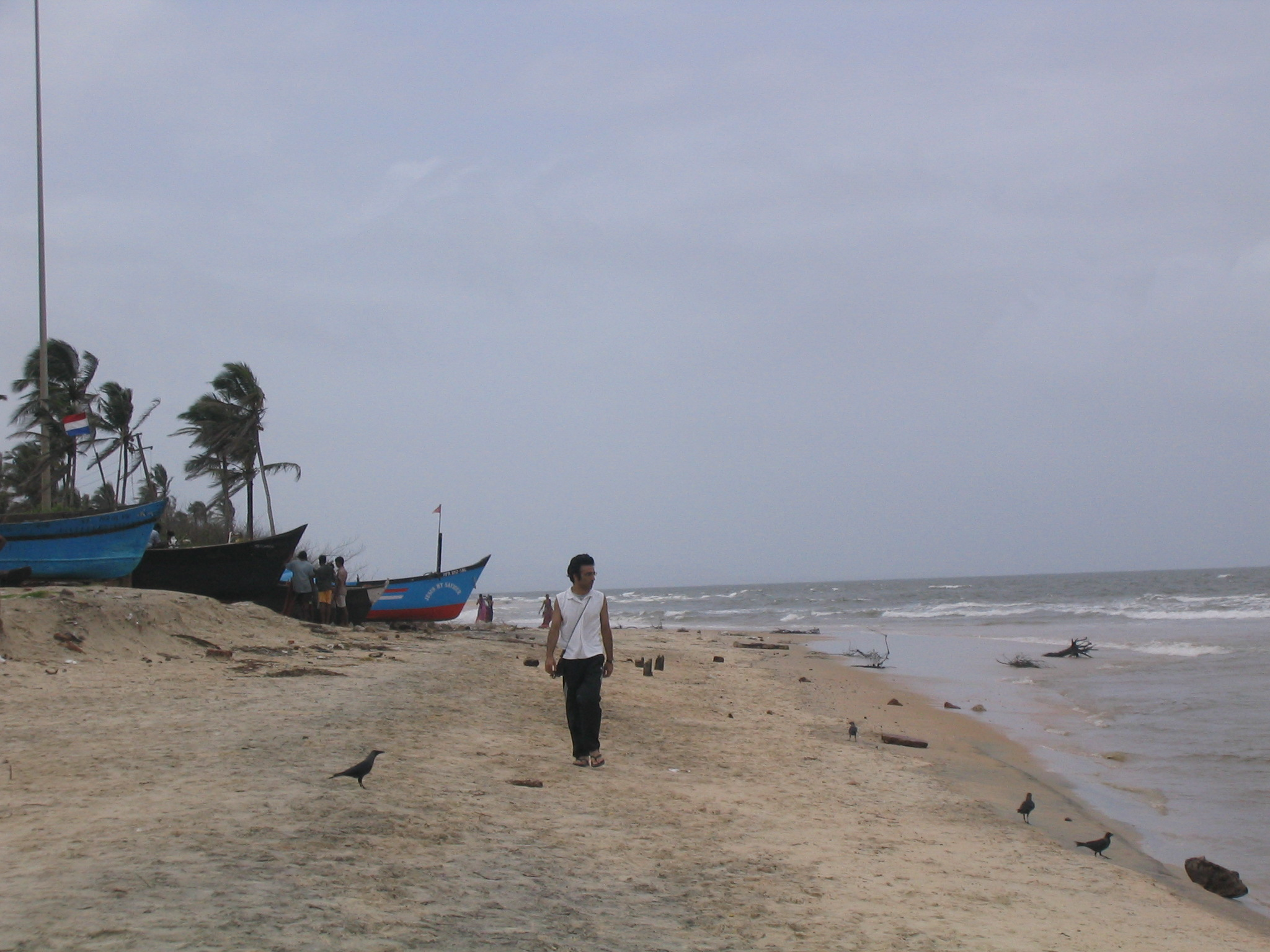 Praia em Margão, em Goa. Beach at Margão, Goa.